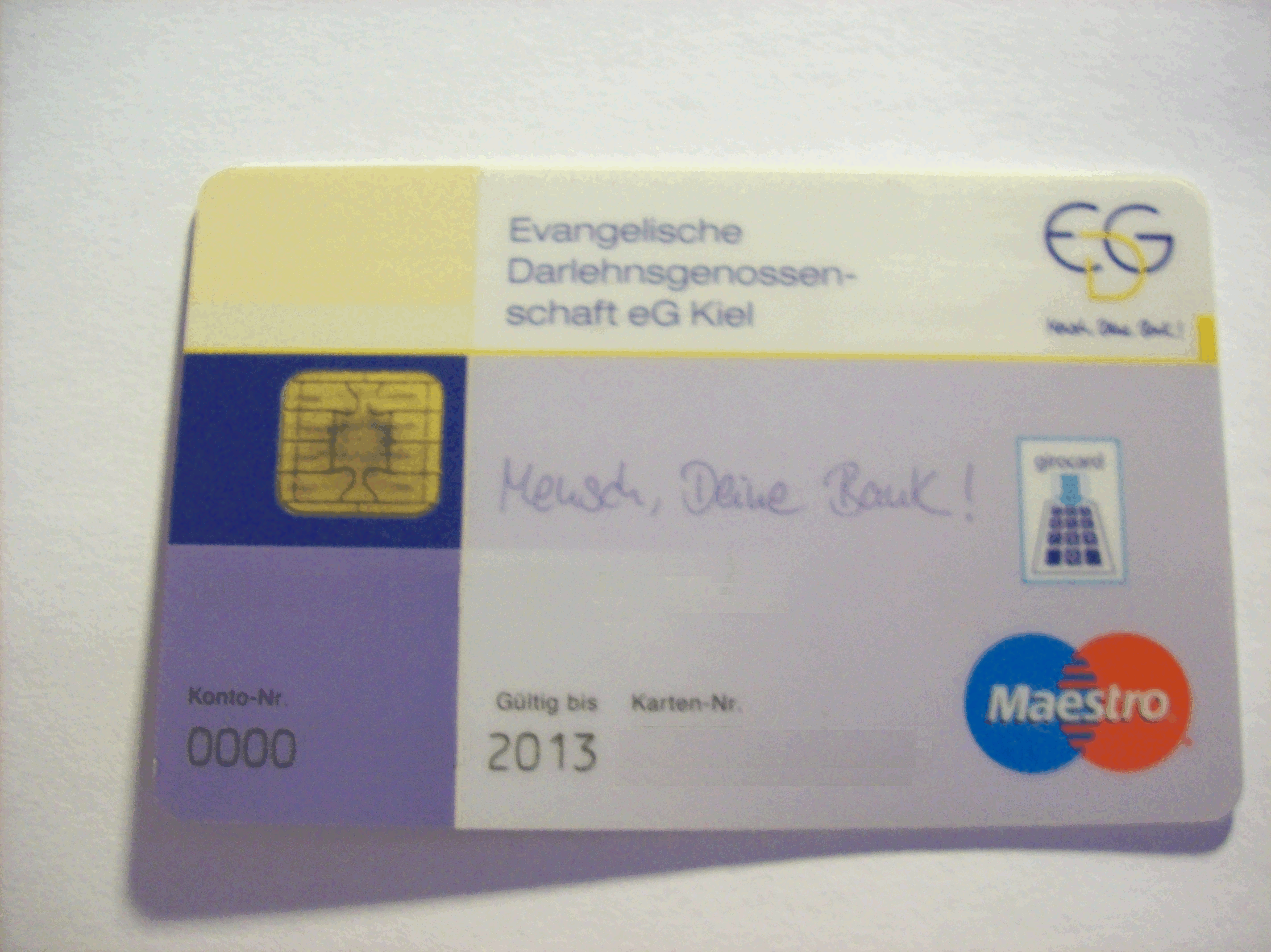 Girocard (Maestro) der Evangelische Darlehnsgenossenschaft eG Kiel